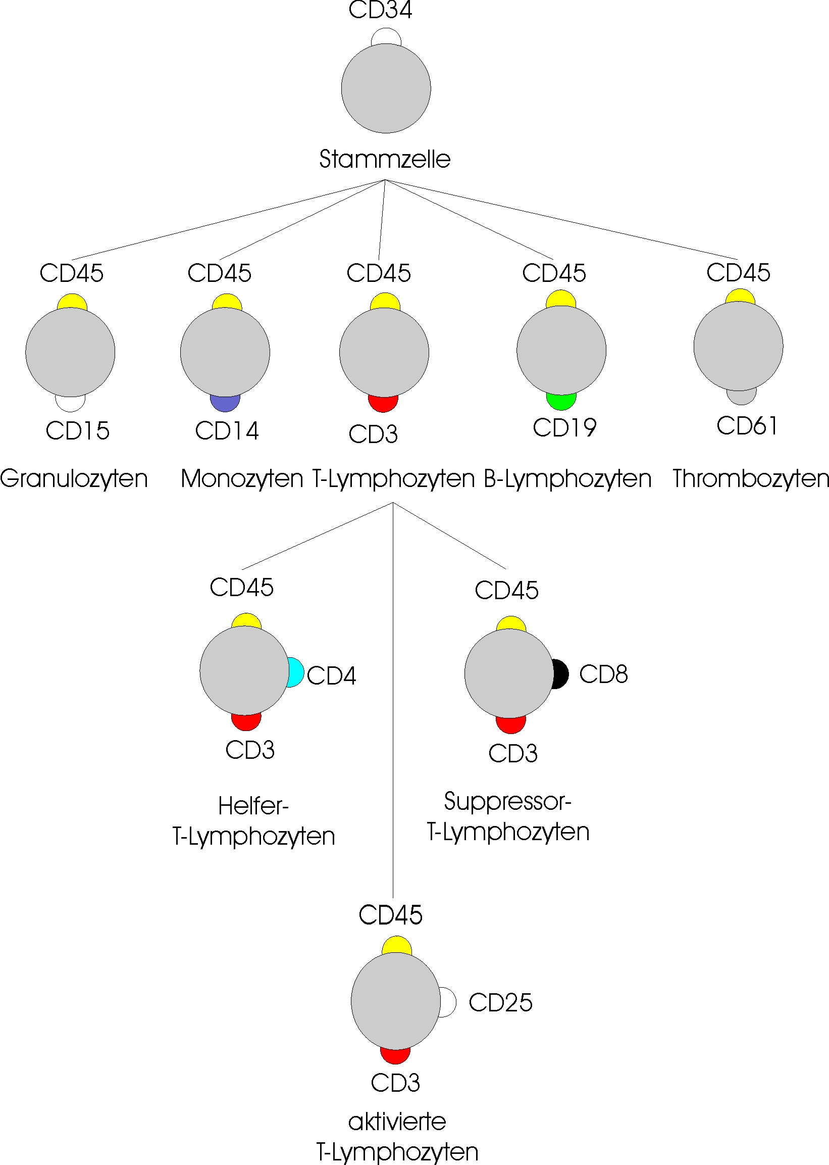 Beschreibung: Differenzierungsantigene und Lymphozytenreifung.jpg *Quelle: Selbst gezeichnet von Dr. Jürgen Groth